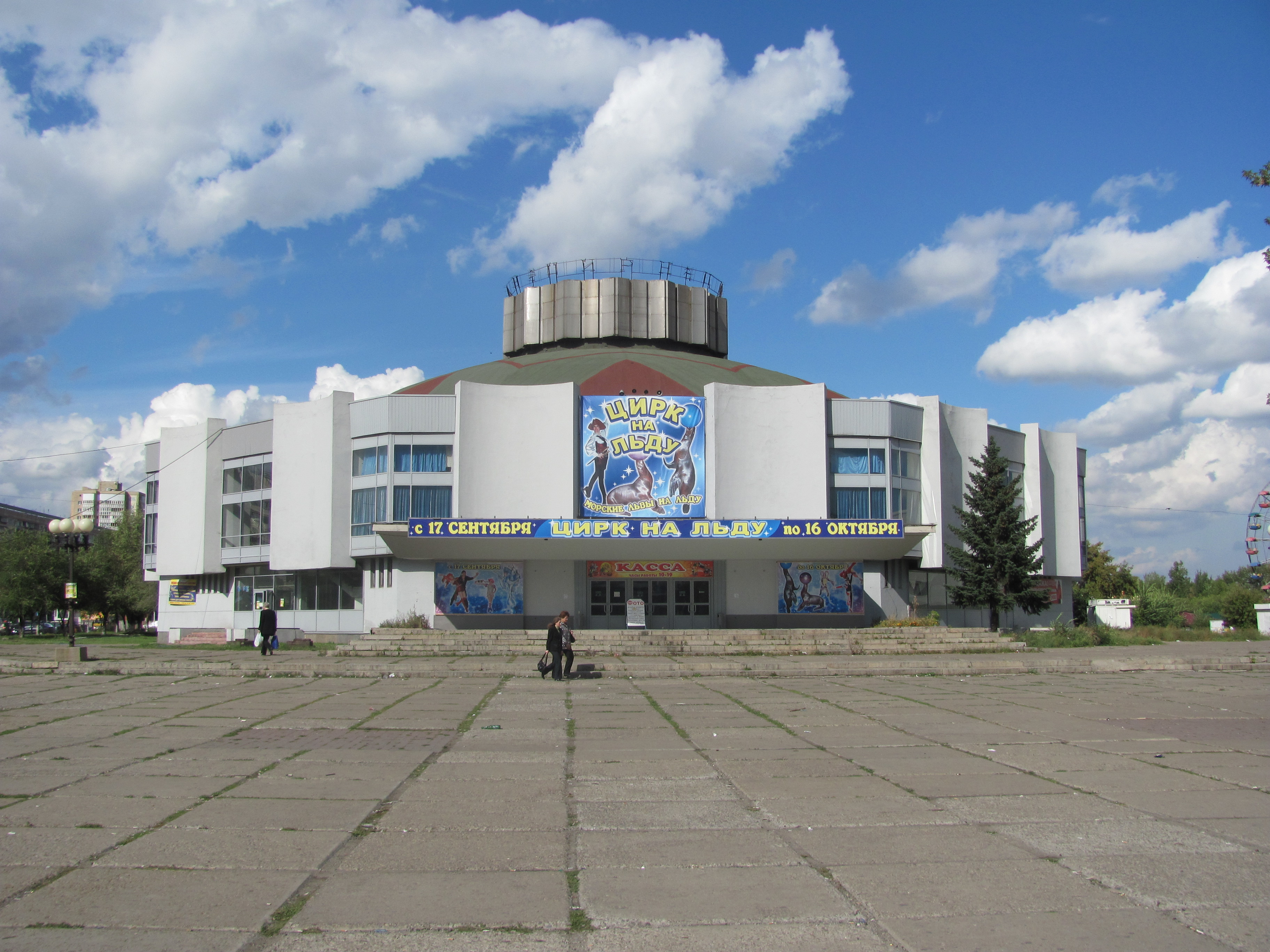 Фото Магнитогорского цирка